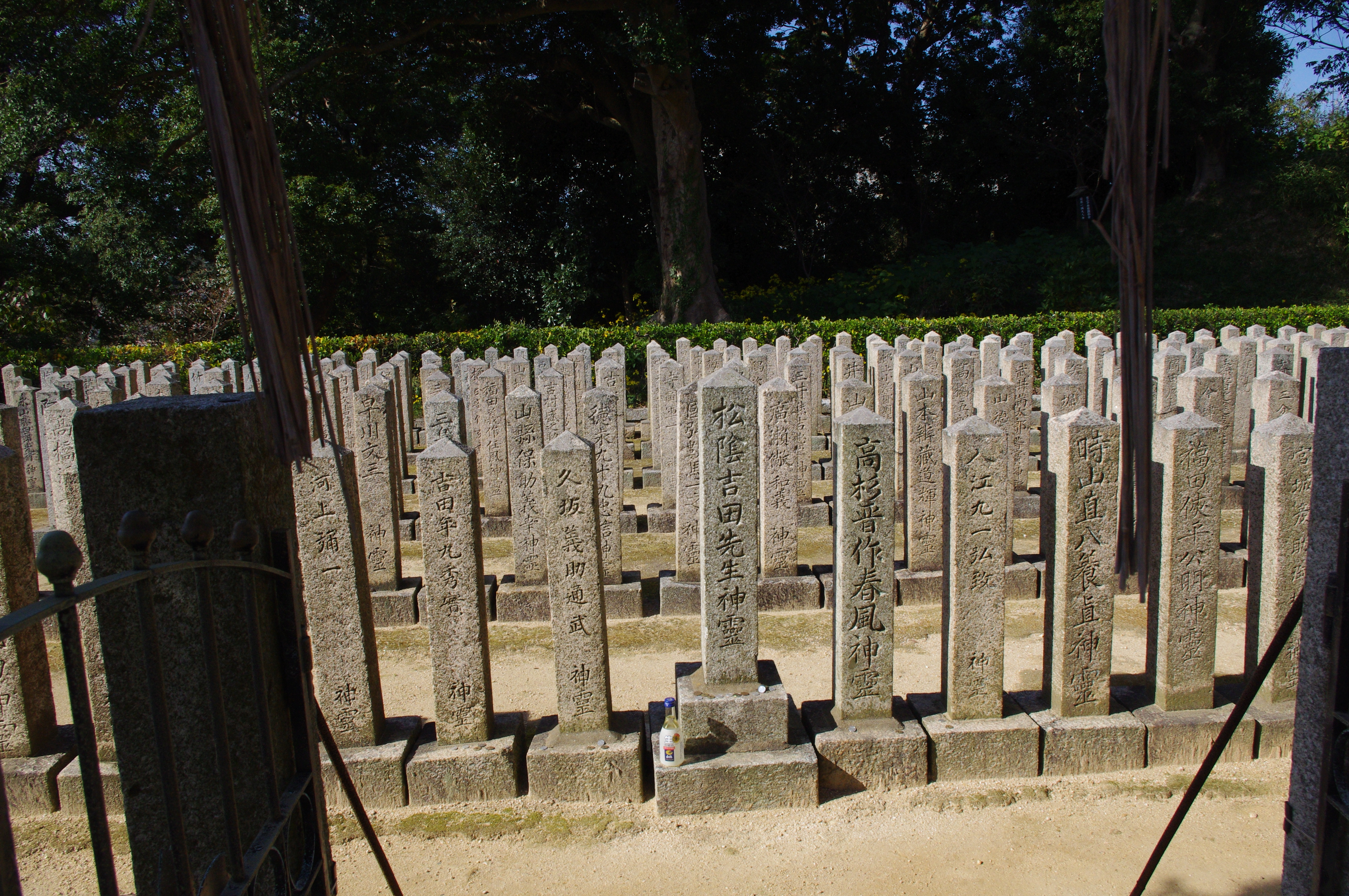 櫻山神社境内にある櫻山招魂社